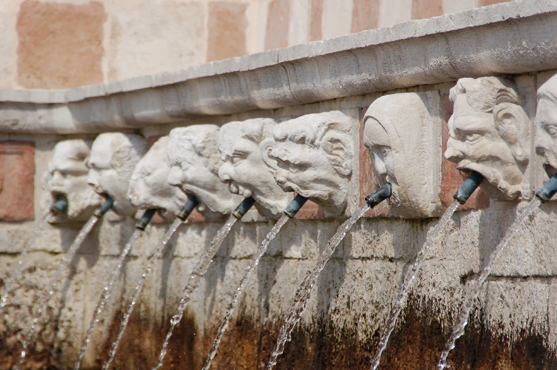 L'Aquila 2011